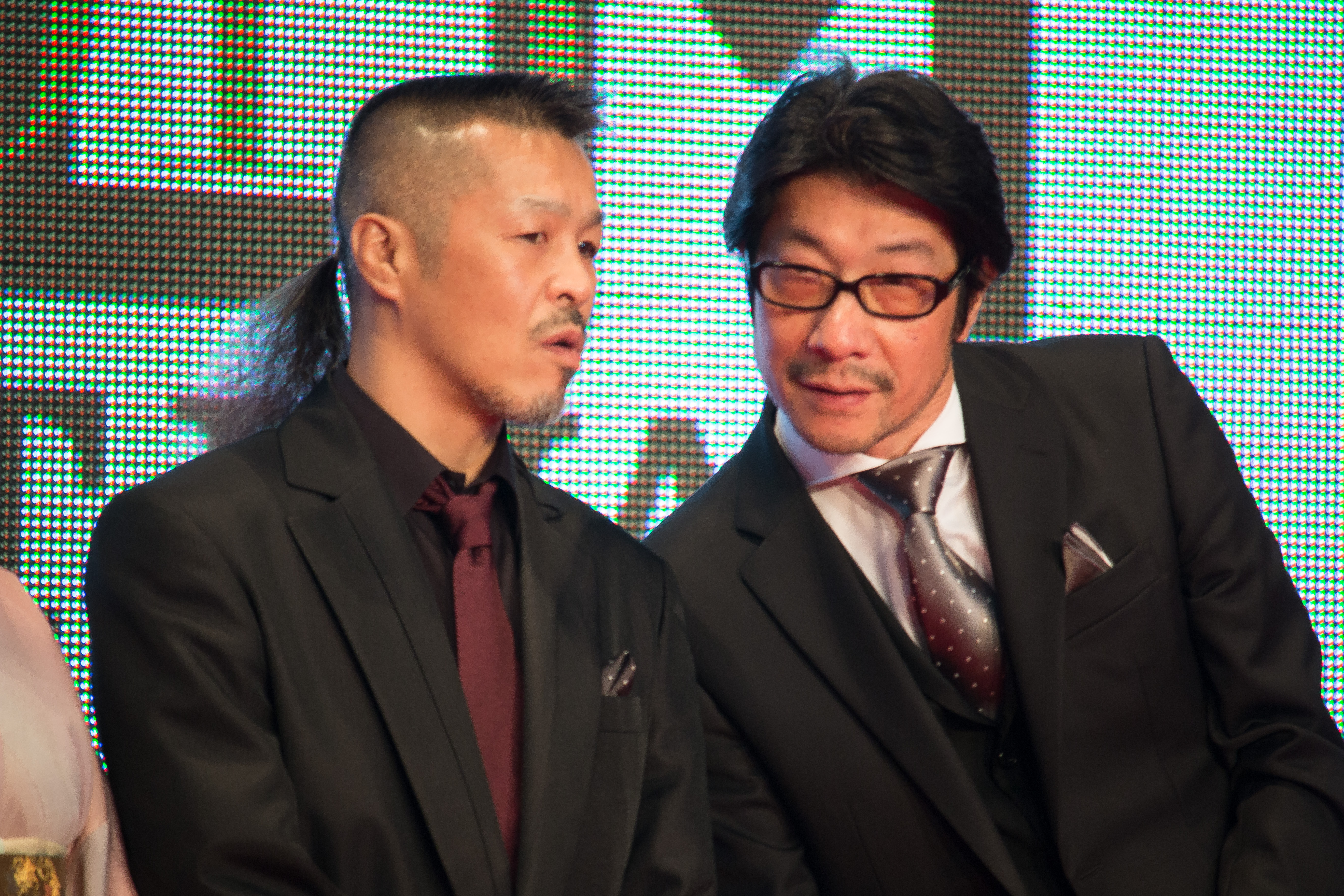 第28回 東京国際映画祭 オープニングセレモニー 辰一郎 阪本順治 (ジョーのあした)